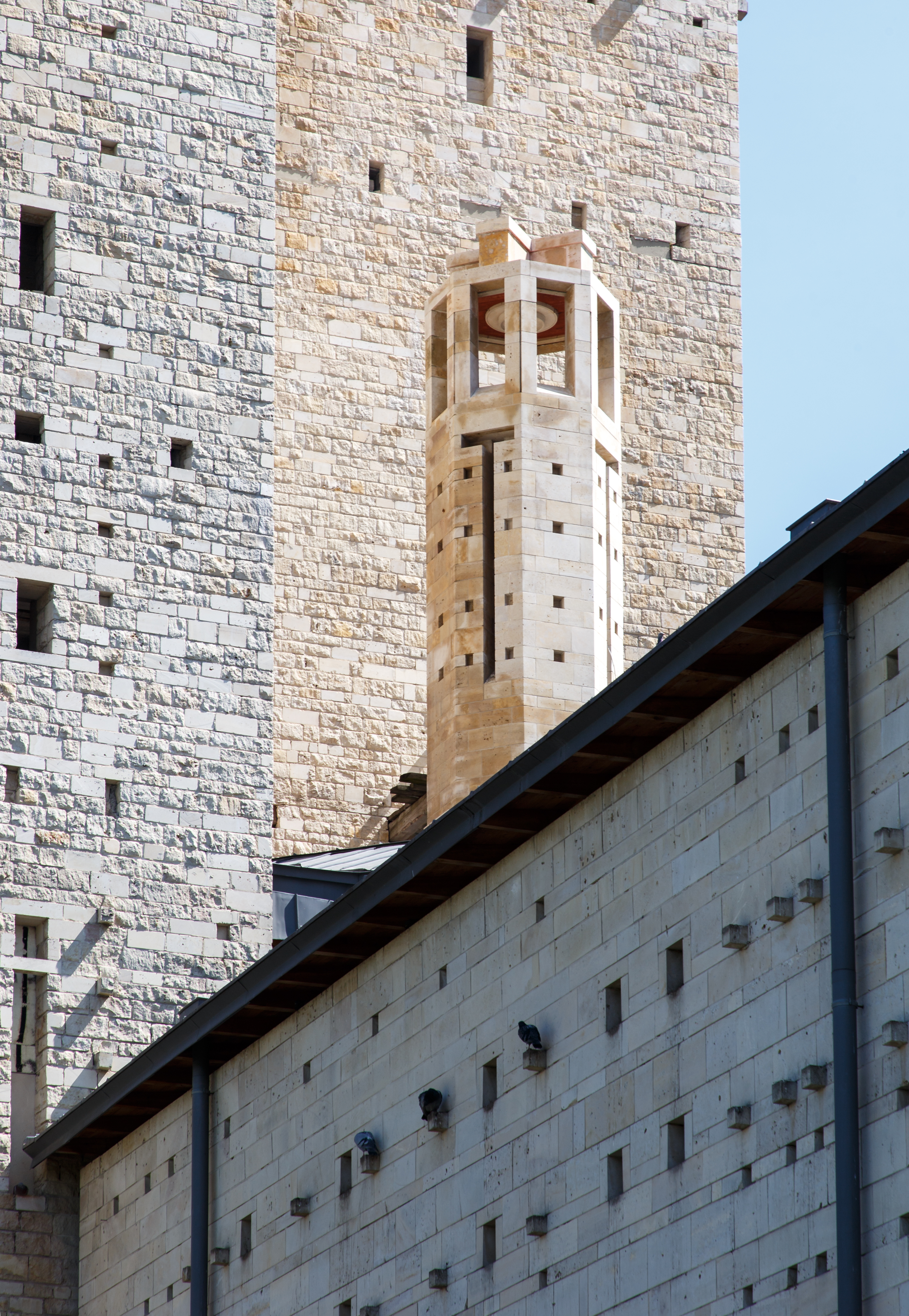 Widok na wieżyczkę znajdującą się nad chrzcielnicą w kościele p.w. św. Franciszka z Asyżu i św. Klary w Tychach (stan budowy na 18.05.2019)